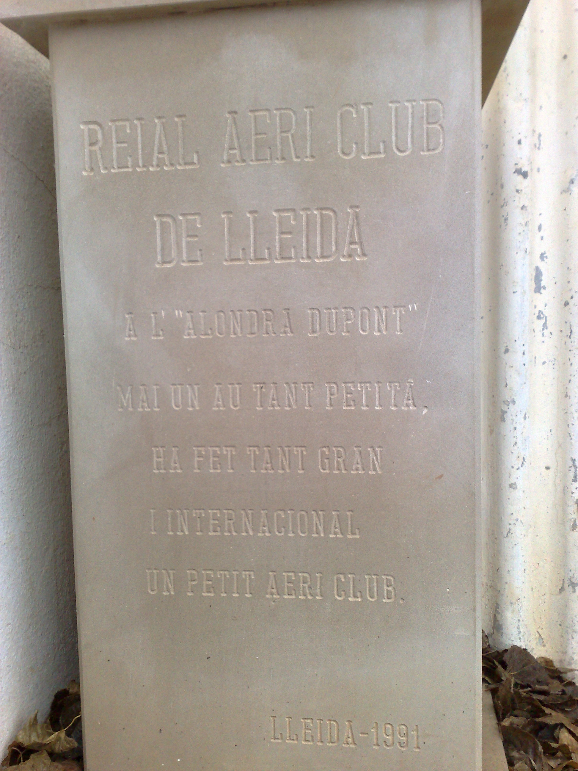 Monument a l'Alondra Dupont, a l'aeròdrom d'Alfés, Al Segrià.